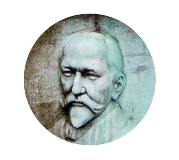 Ernest Cambier, monument du parc Josaphat à Schaarbeek. Libre de droit